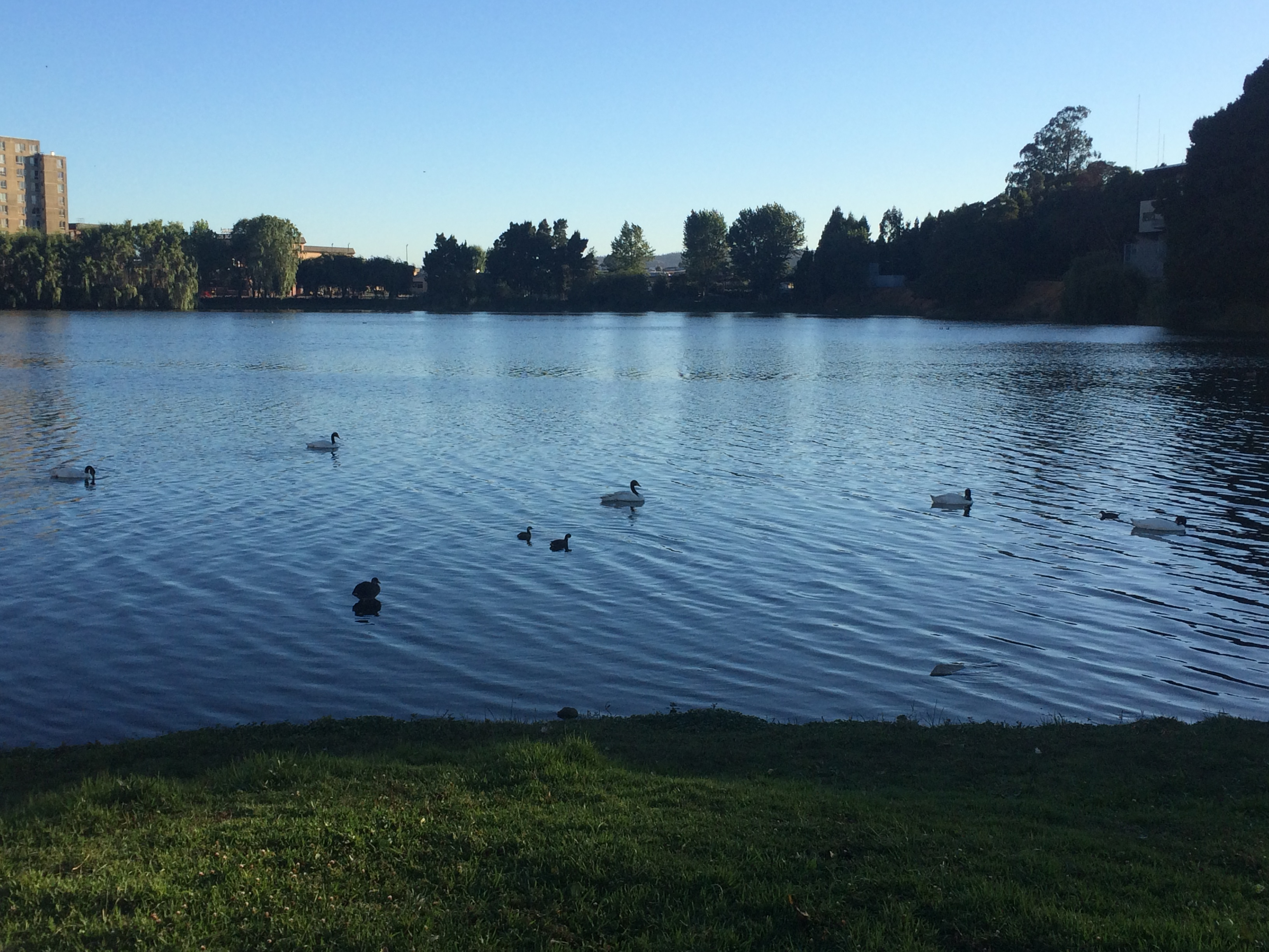 Laguna Tres Pascualas en 2019